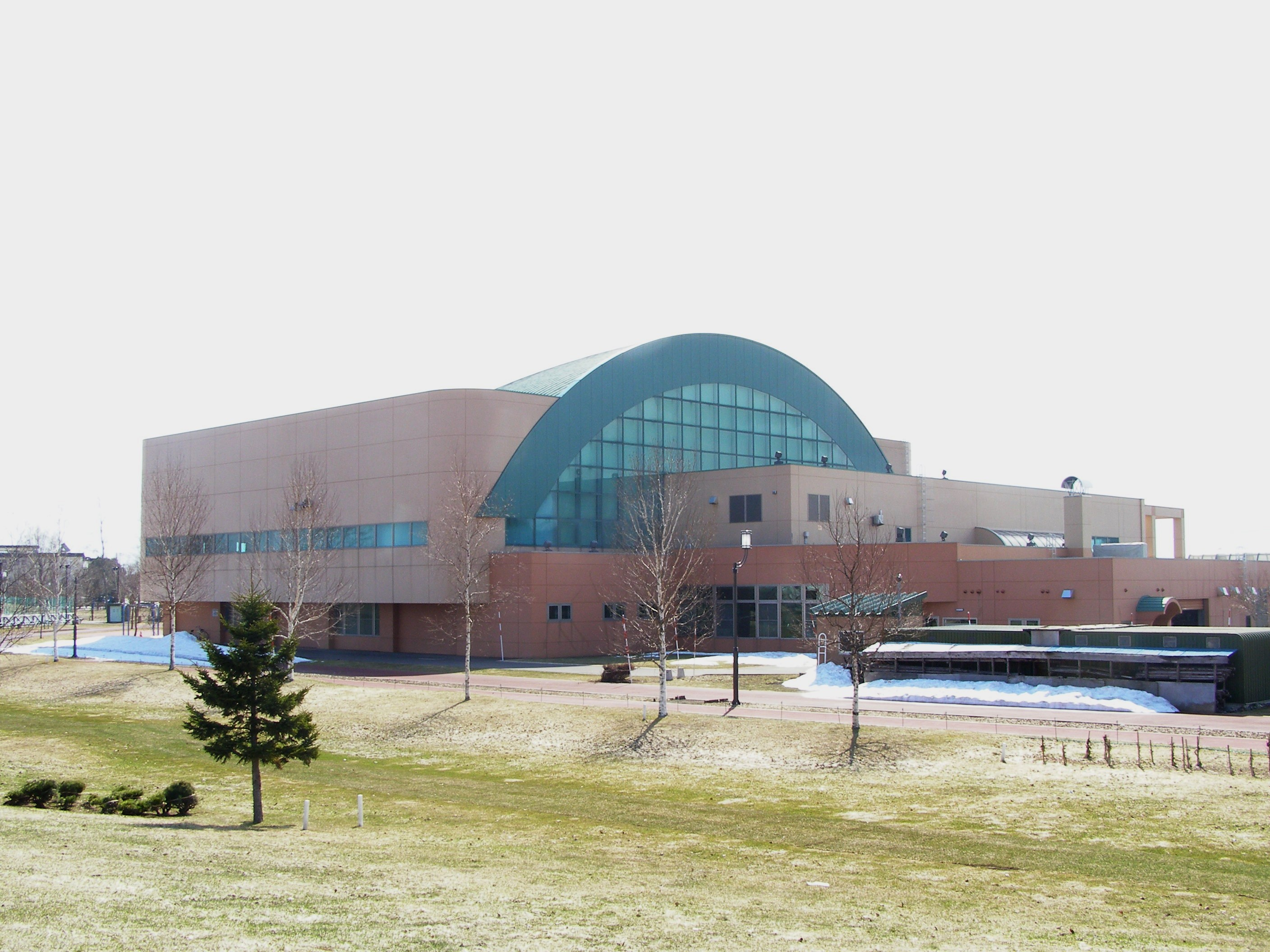 旭川市忠和公園体育館外観